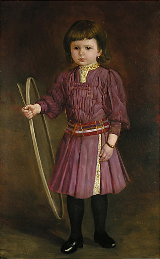 Porträt eines Kindes mit Schlagreif